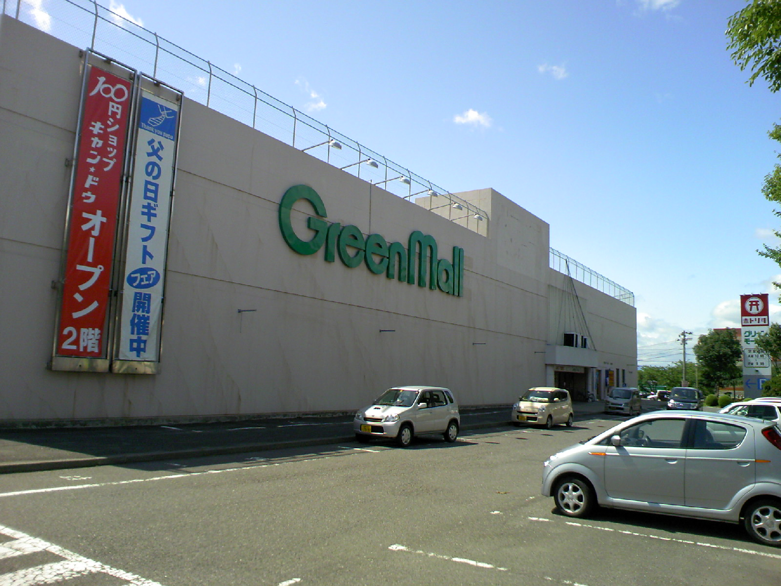 赤トリヰグリーンモール（営業当時）